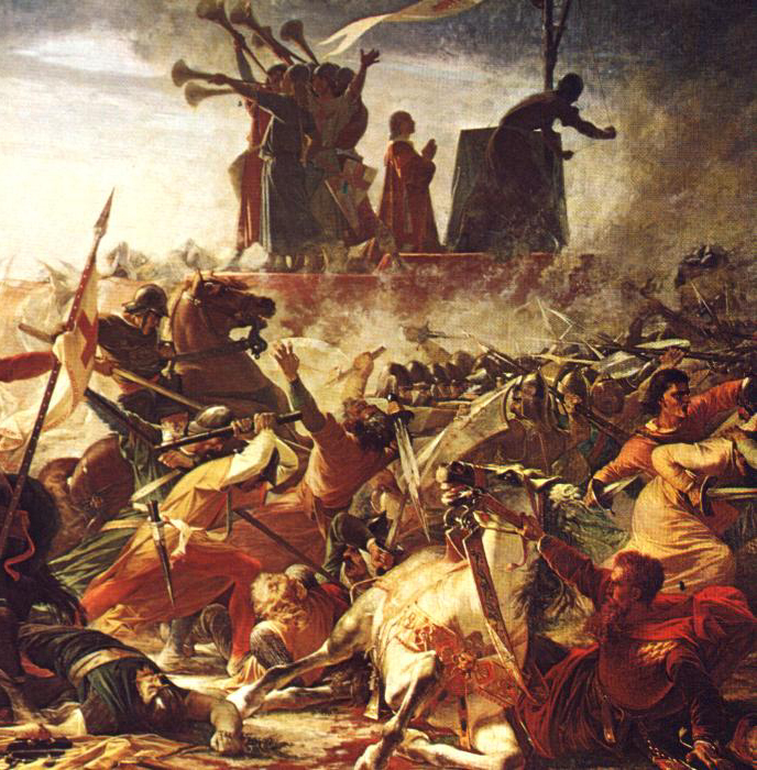 Battaglia di Legnano. particolare da un quadro di Amos Cassioli (1832-1891)